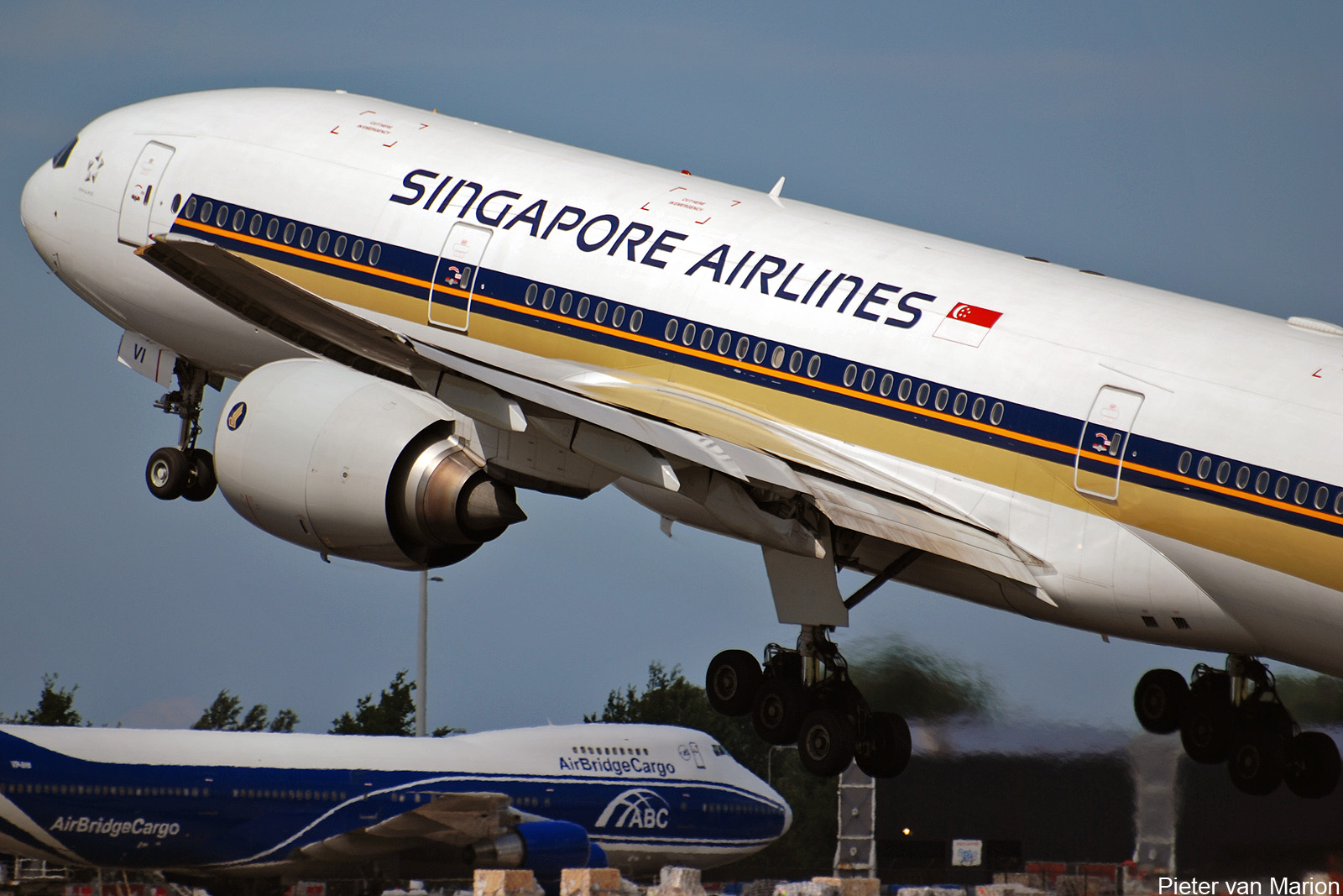 Airlines Boeing 777